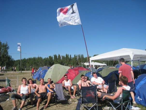 Lejr på Roskilde Festivals camps east.